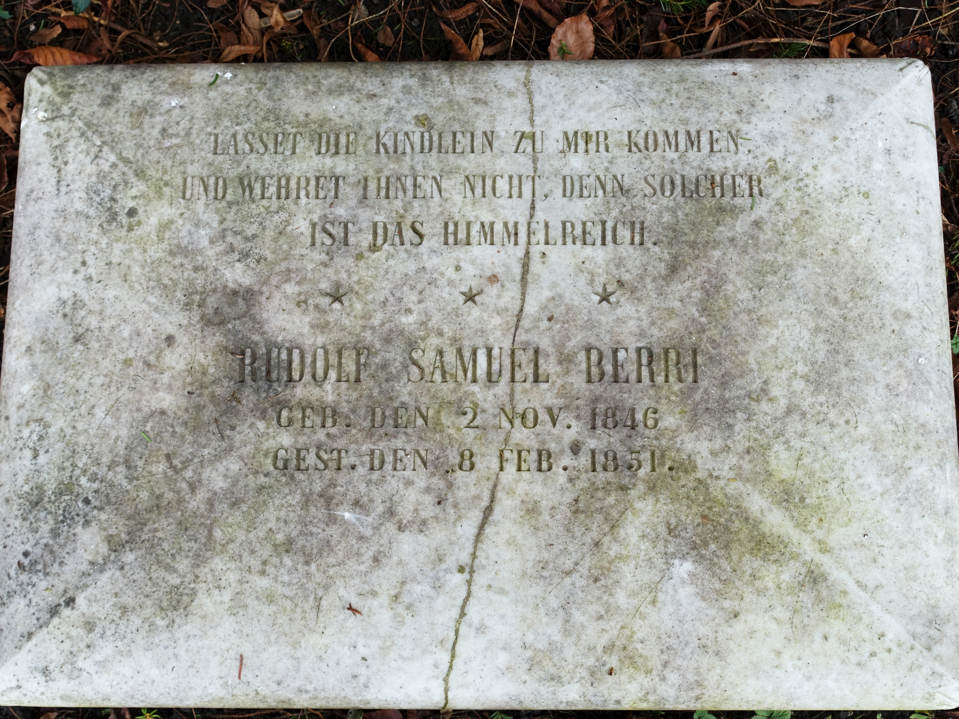 St. Alban-Kirchhof in Basel. Grab von Melchior Berri (1801-1854) neben seinem Sohn Rudolf Samuel der dort 1851 beerdigt wurde.